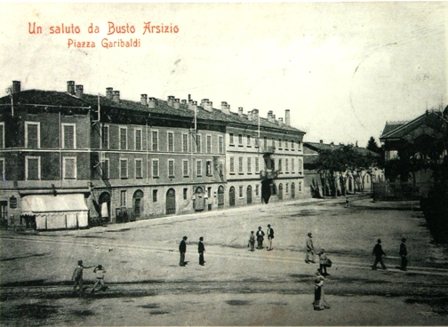 La piazza Giuseppe Garibaldi di Busto Arsizio nel 1910.